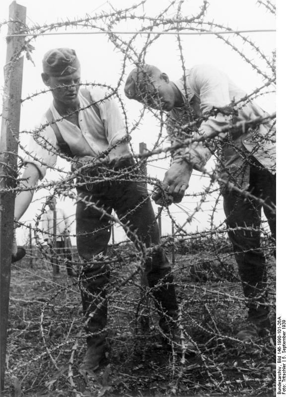 Bei Ensdorf 5.9.39 Bau von Drahtverhauen. Wenn der Stacheldraht sich auch sperrt und piekt, die Sicherheit der eigenen Stellung gewinnt mit jedem Meter, der im Drahtverhau verarbeitet wird. Prop.Kp: 612 Bildberichter: Tritschler